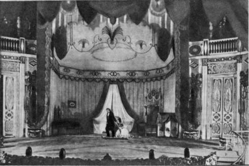 "Маскарад" Лермонтова